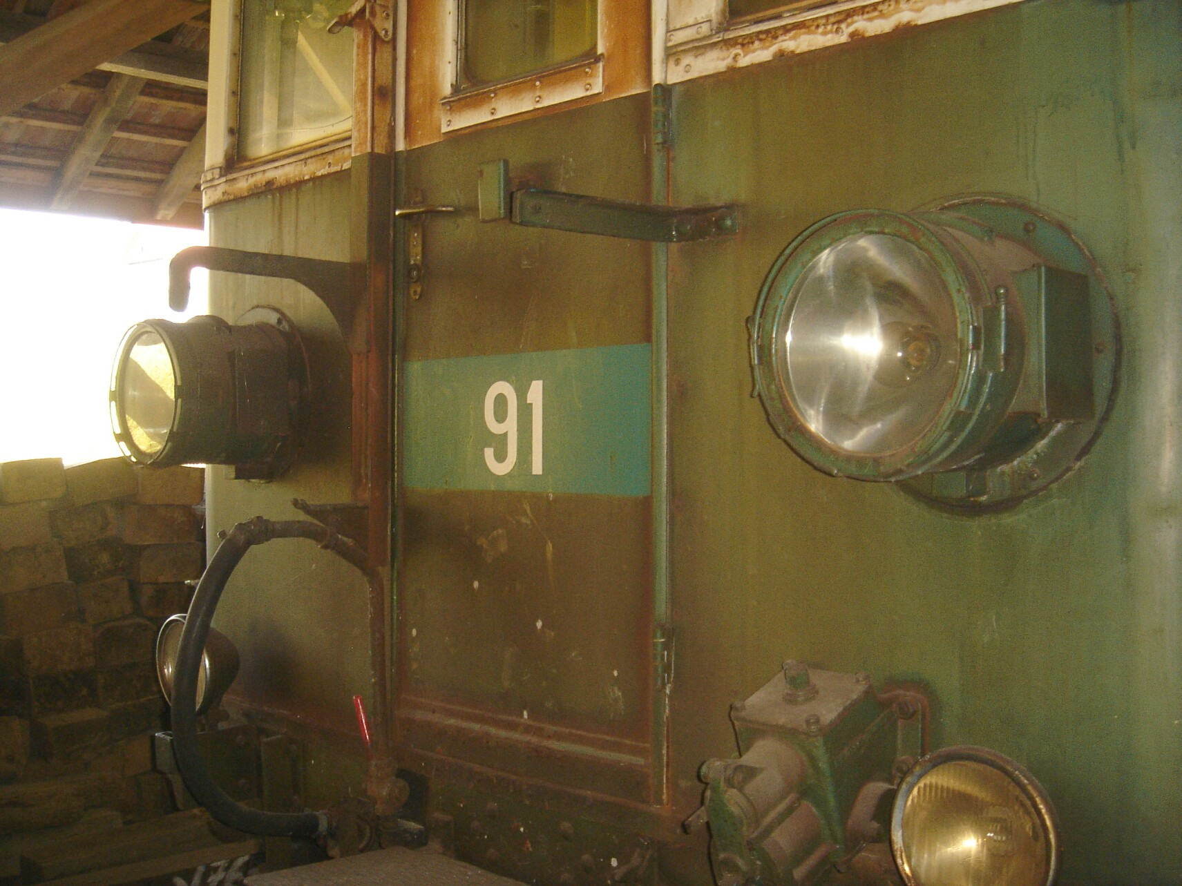 Front des Xeh 4/4 91 der Appenzeller Bahnen ex SGA BCFeh 4/4 1 (Serie 1-5) von 1931 im Schuppen von La Traction in Pré-Petitjean. Inzwischen wurde der Triebwagen abgebrochen.